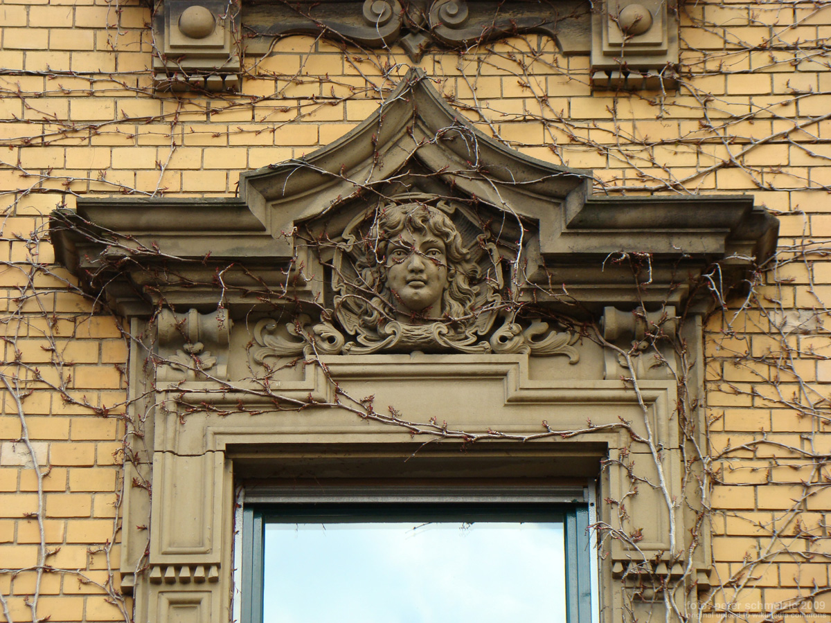 Uhlandstraße 61 in Heilbronn, Fassadendetail